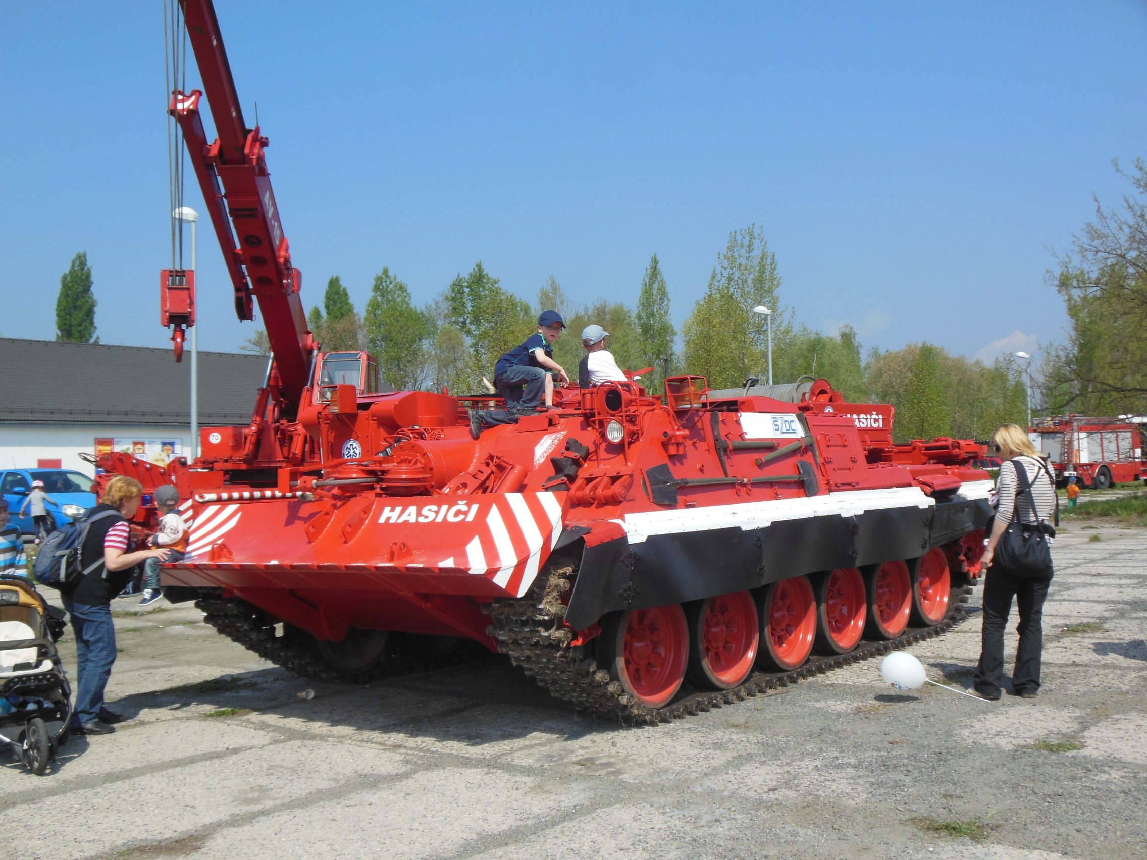 1. regionální den PID - 50 let "pantografů". Vyprošťovací tank Hasičské záchranné služby SŽDC u Penny Marketu v ulici Armádní v Milovicích (okres Nymburk).